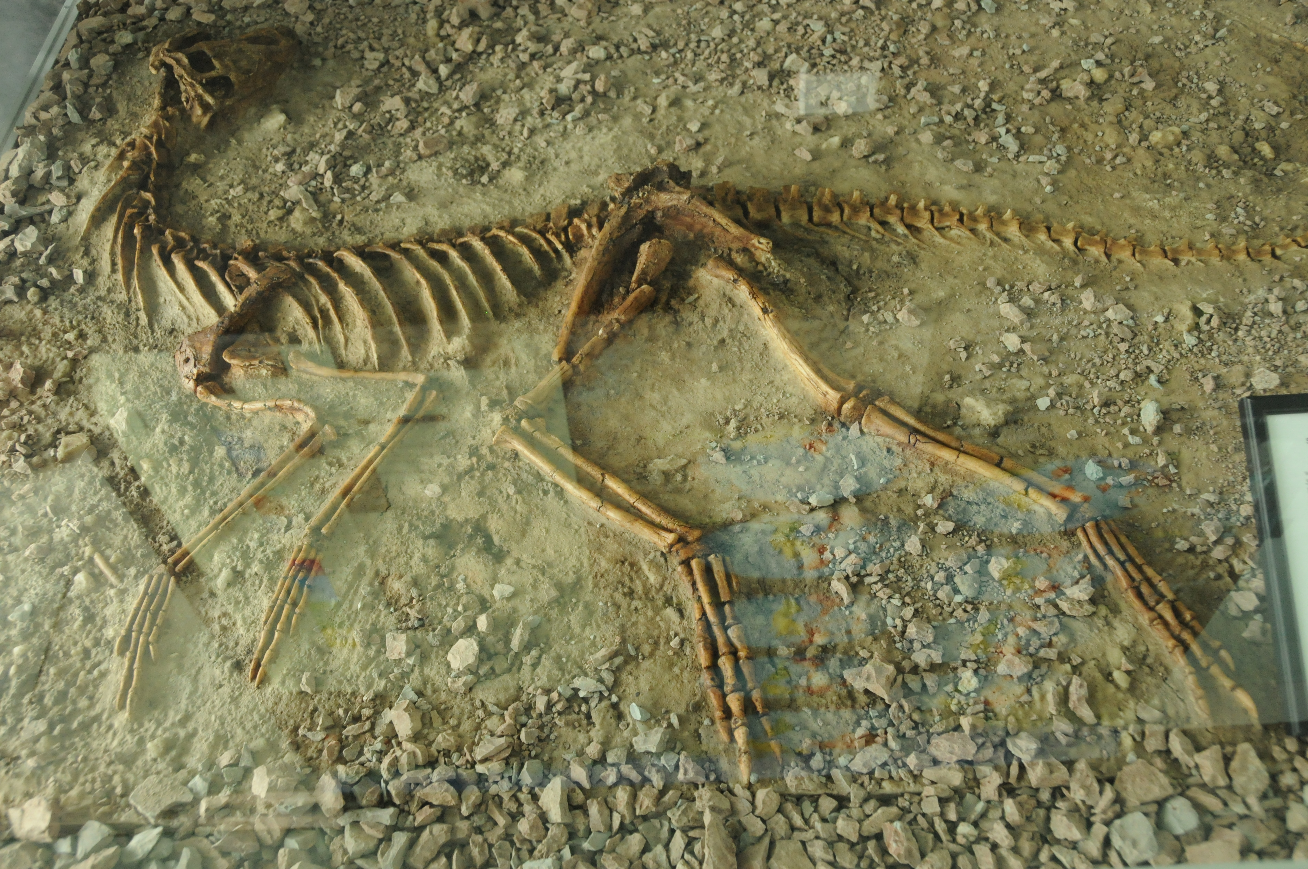 Szkielet Silesaurusa w dinoparku w Krasiejowie